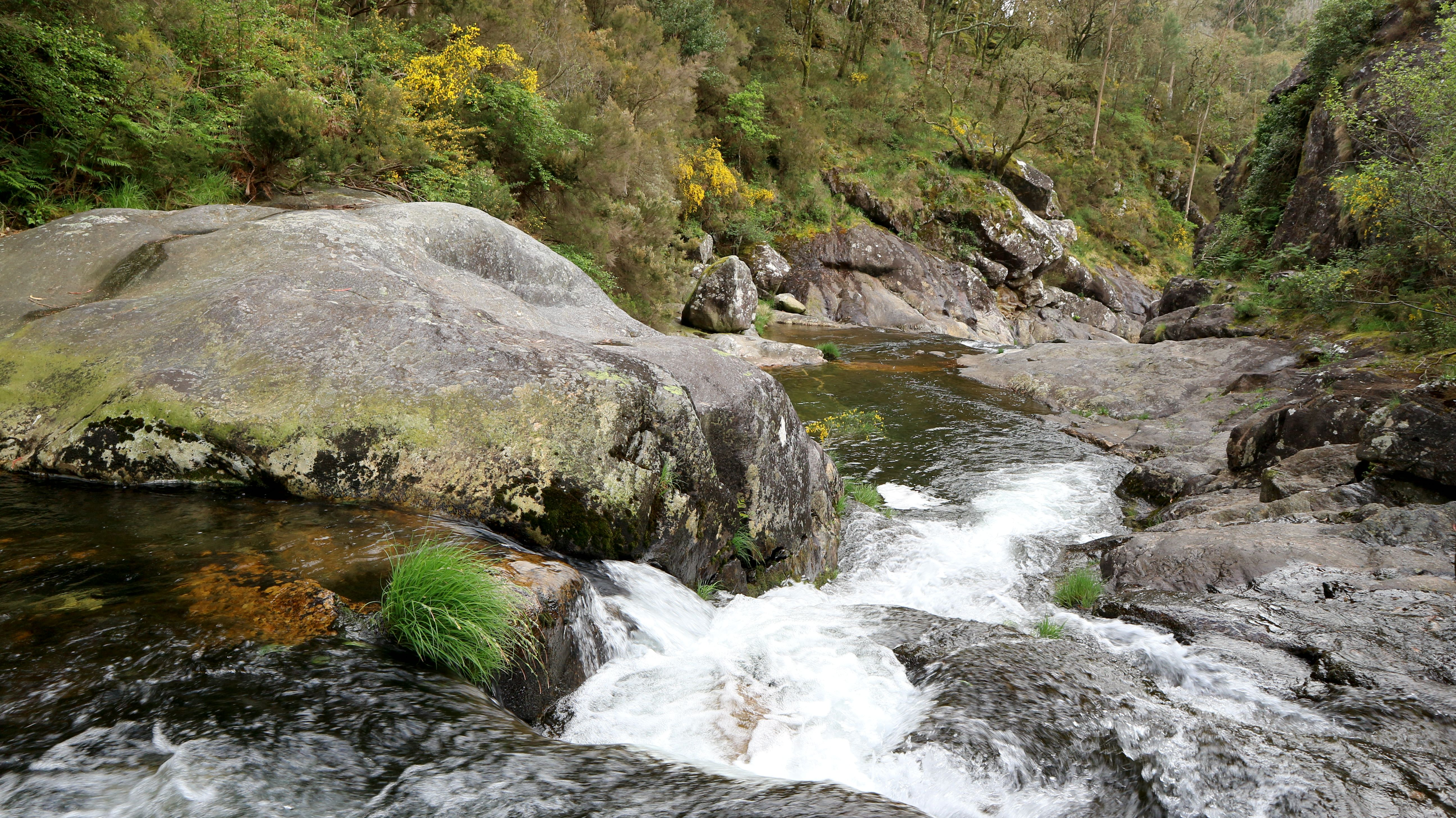 As pozas do río Pedras e as súas fervenzas. A Pobra do Caramiñal, A Coruña.